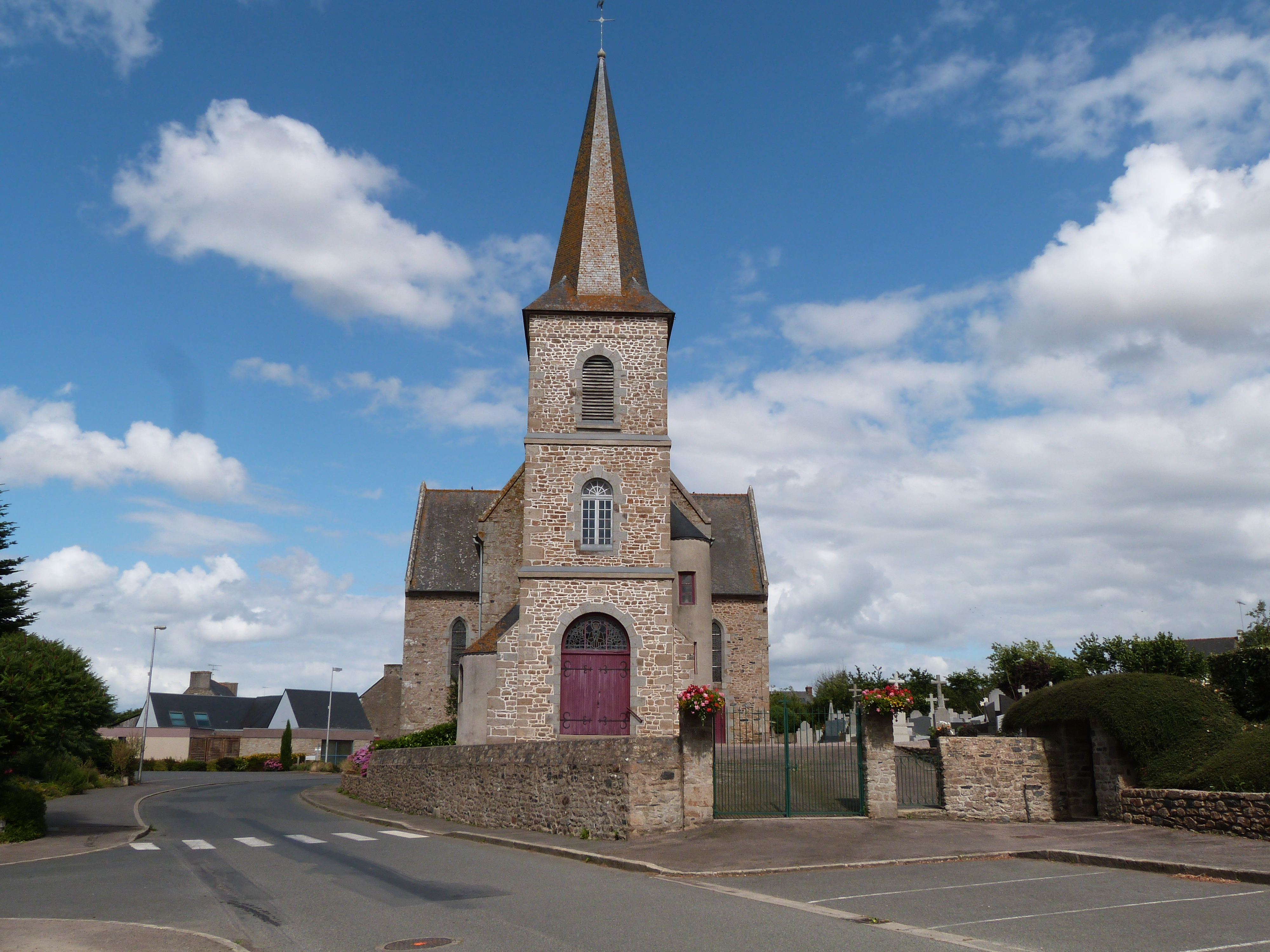 Eglise Saint-Guihen (ou Saint-Guéhen) de Landéhen